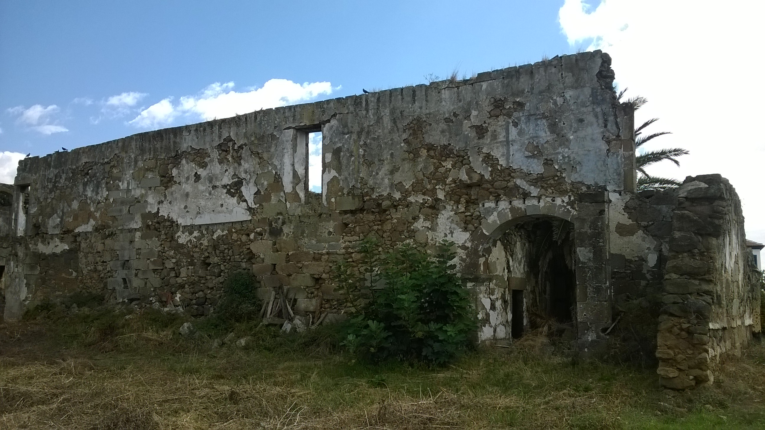 Convento de Nossa Senhora da Conceição, freguesia de Nossa Senhora da Conceição, concelho de Angra do Heroísmo, Ilha Terceira, Região Autónoma dos Açores.